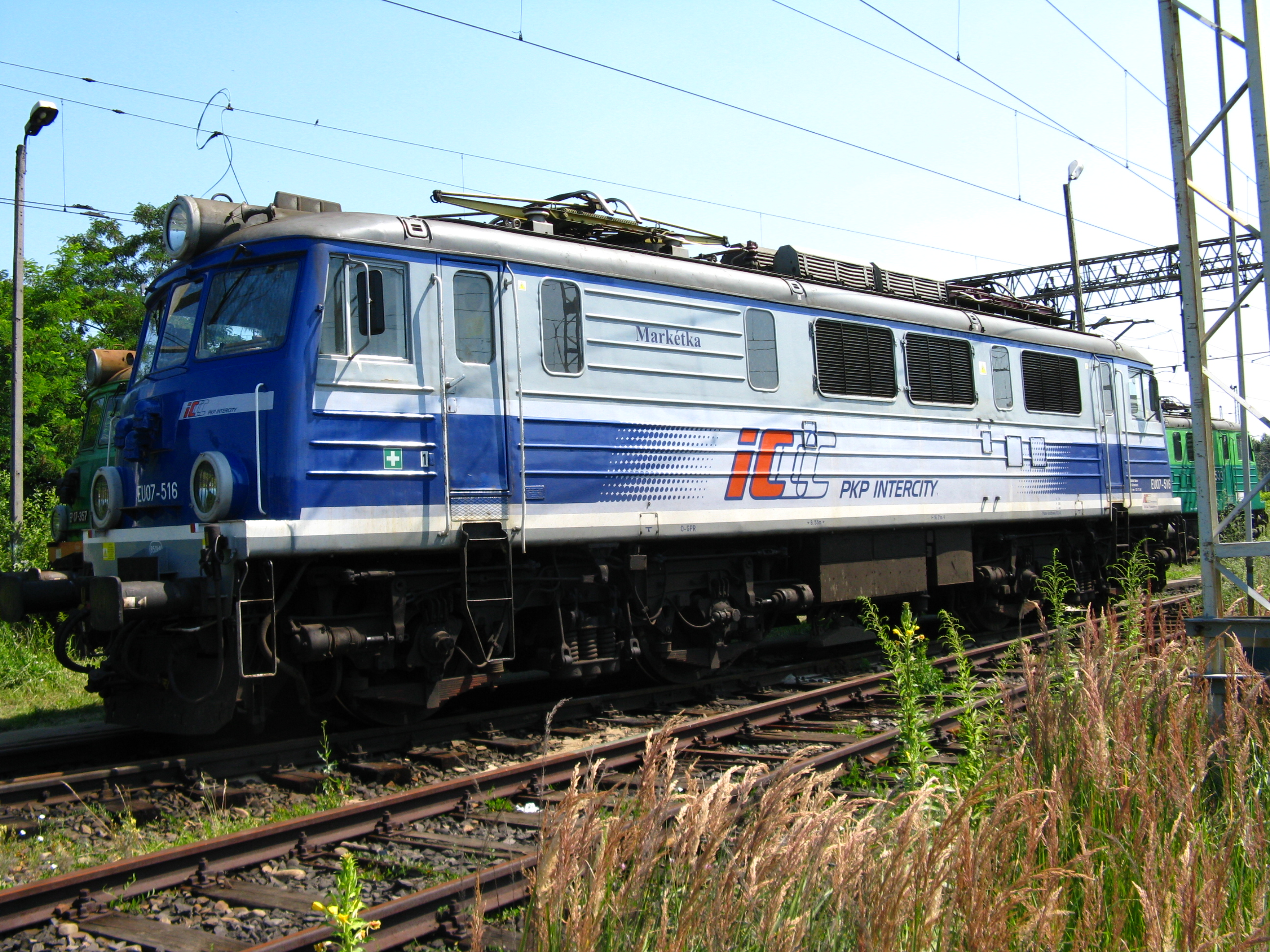 Lokomotiva polské společnosti PKP InterCity, EU07-516 "Markétka" zajíždějící na české tratě.